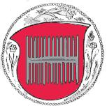 Kempten am Rhein (Bingen am Rhein), ältestes Ortswappen von 1462